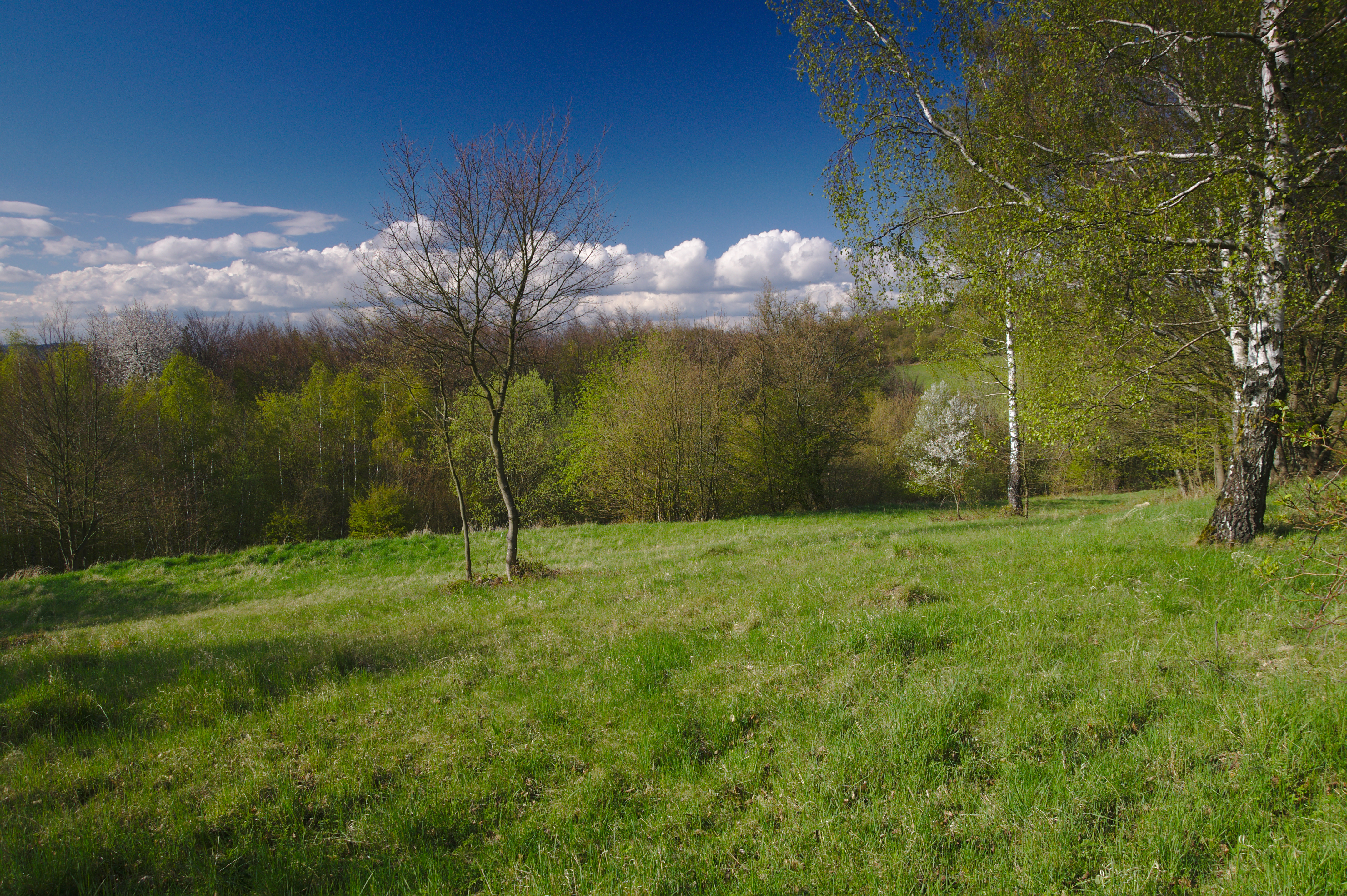 Veselská lada, okres Brno-venkov